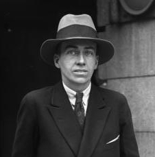 Cornelius Vanderbilt IV